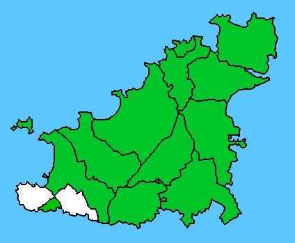 Carte des paroisses de Guernesey. Situation de la paroisse de Torteval ( en blanc sur la carte).